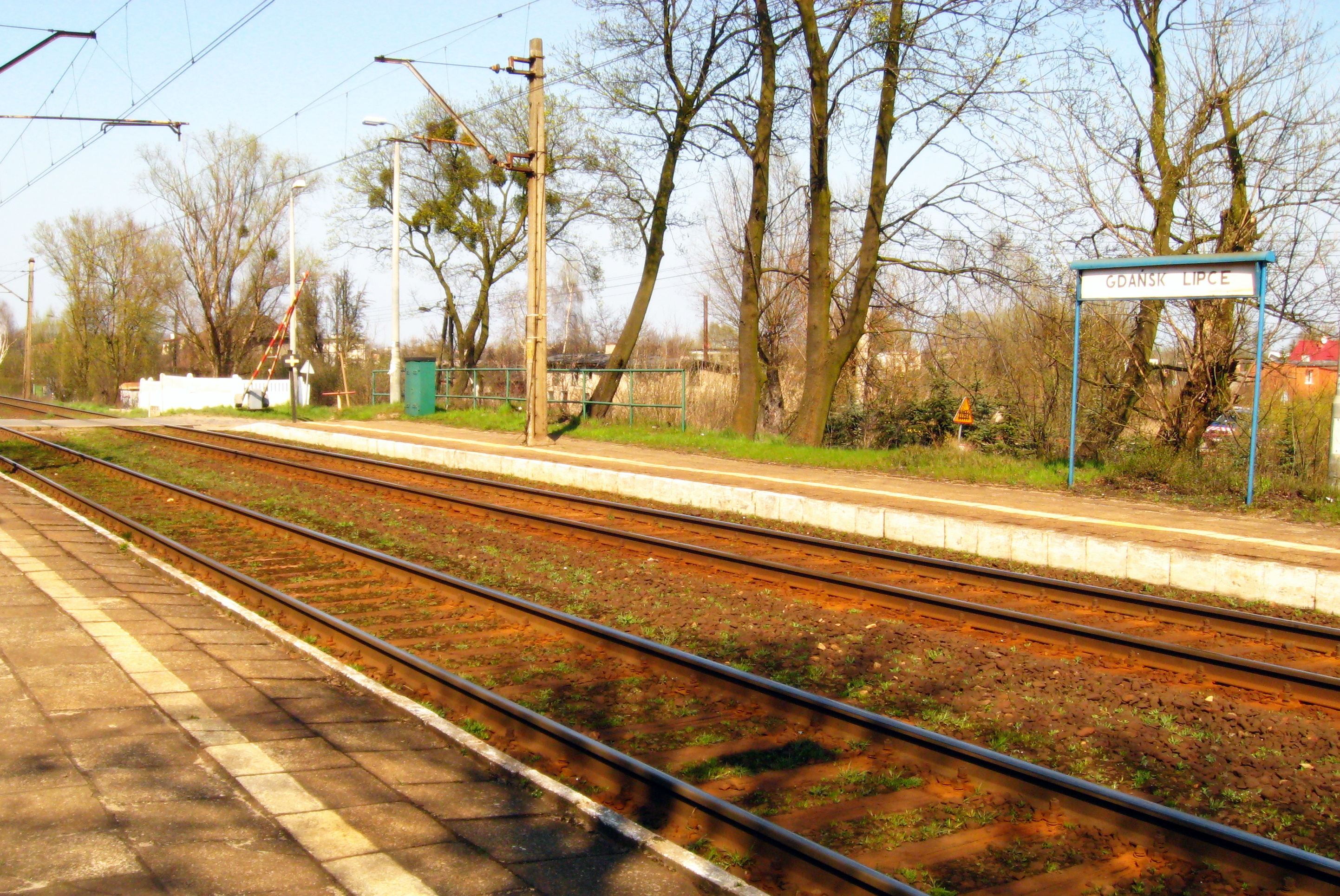 Przystanek kolejowy Gdańsk-Lipce (dwa perony przystanku; na zdjęciu widać też przejazd kolejowy, natomiast budka dróżnika jest poza kadrem)